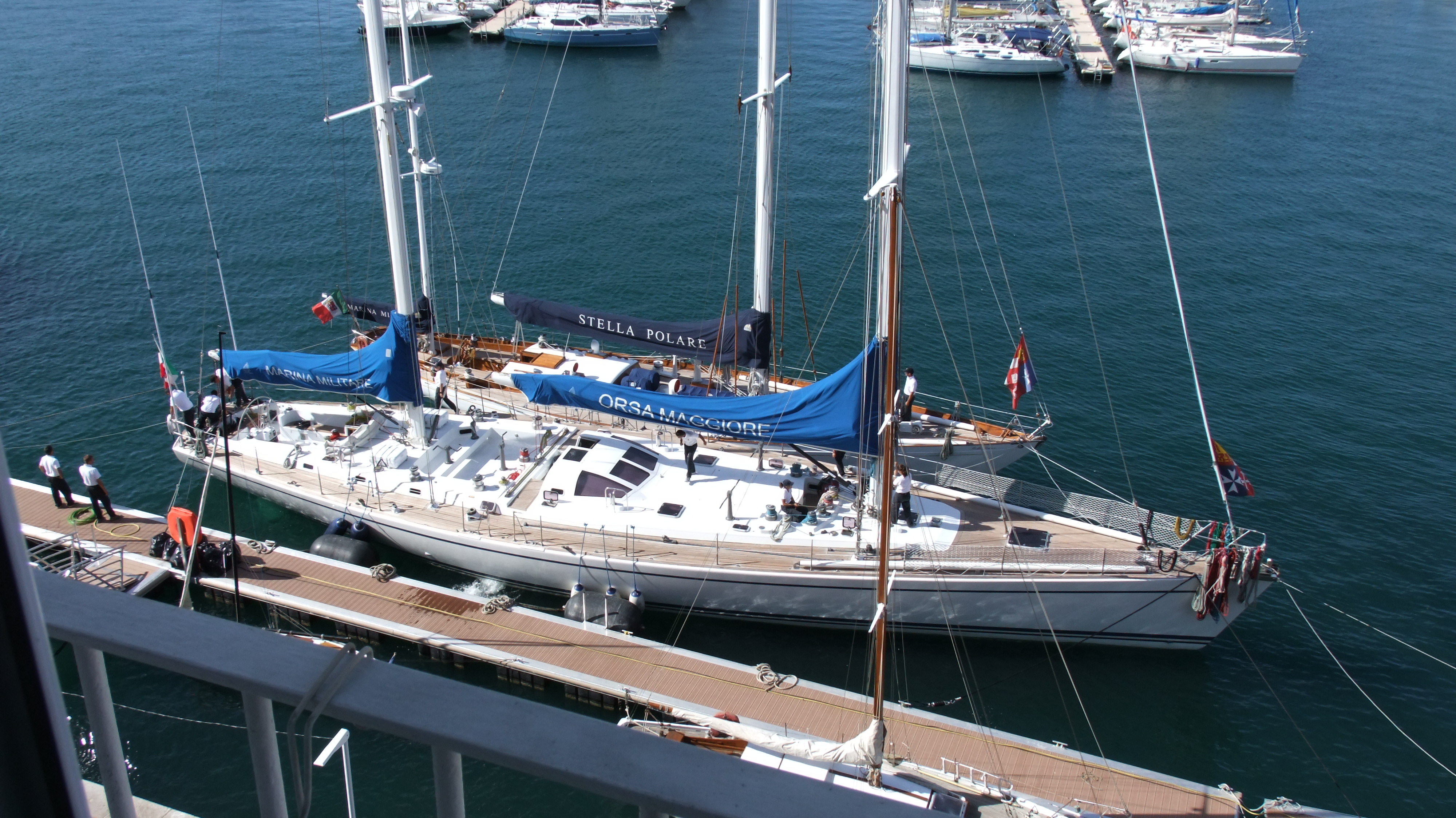 Orsa Maggiore navire école de la marine italienne es escale à Toulon accompagné de 3 autres navires école